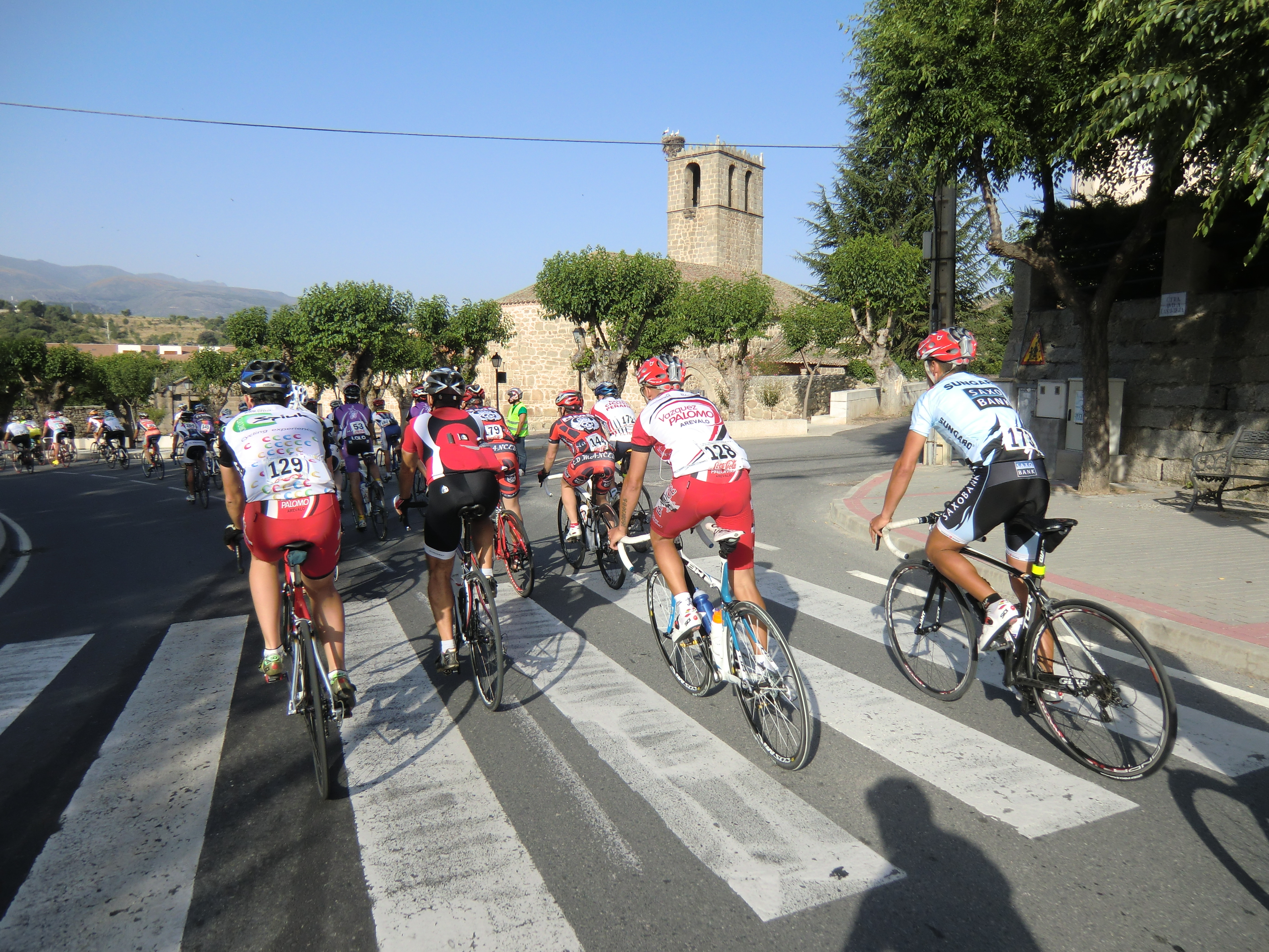 I Marcha Cicloturista José María Jiménez 2011